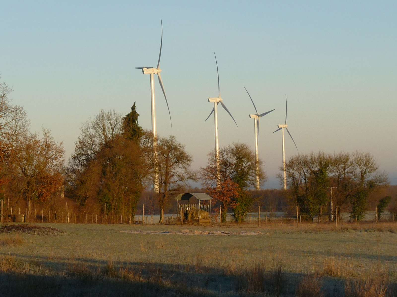 éoliennes vues de la route entre Aussac et Vadalle, Charente, France